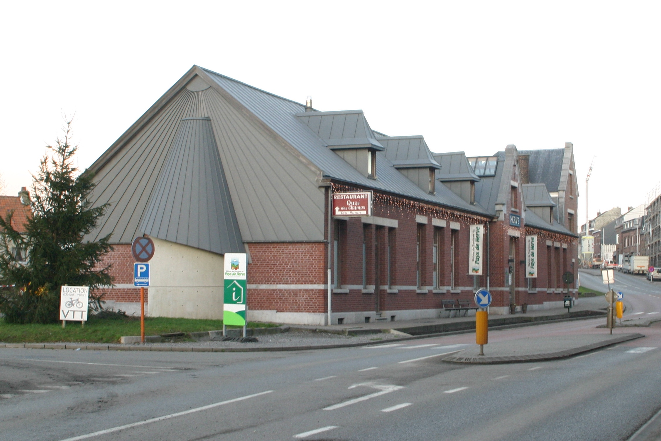 D'Gare vun Herve 2007.